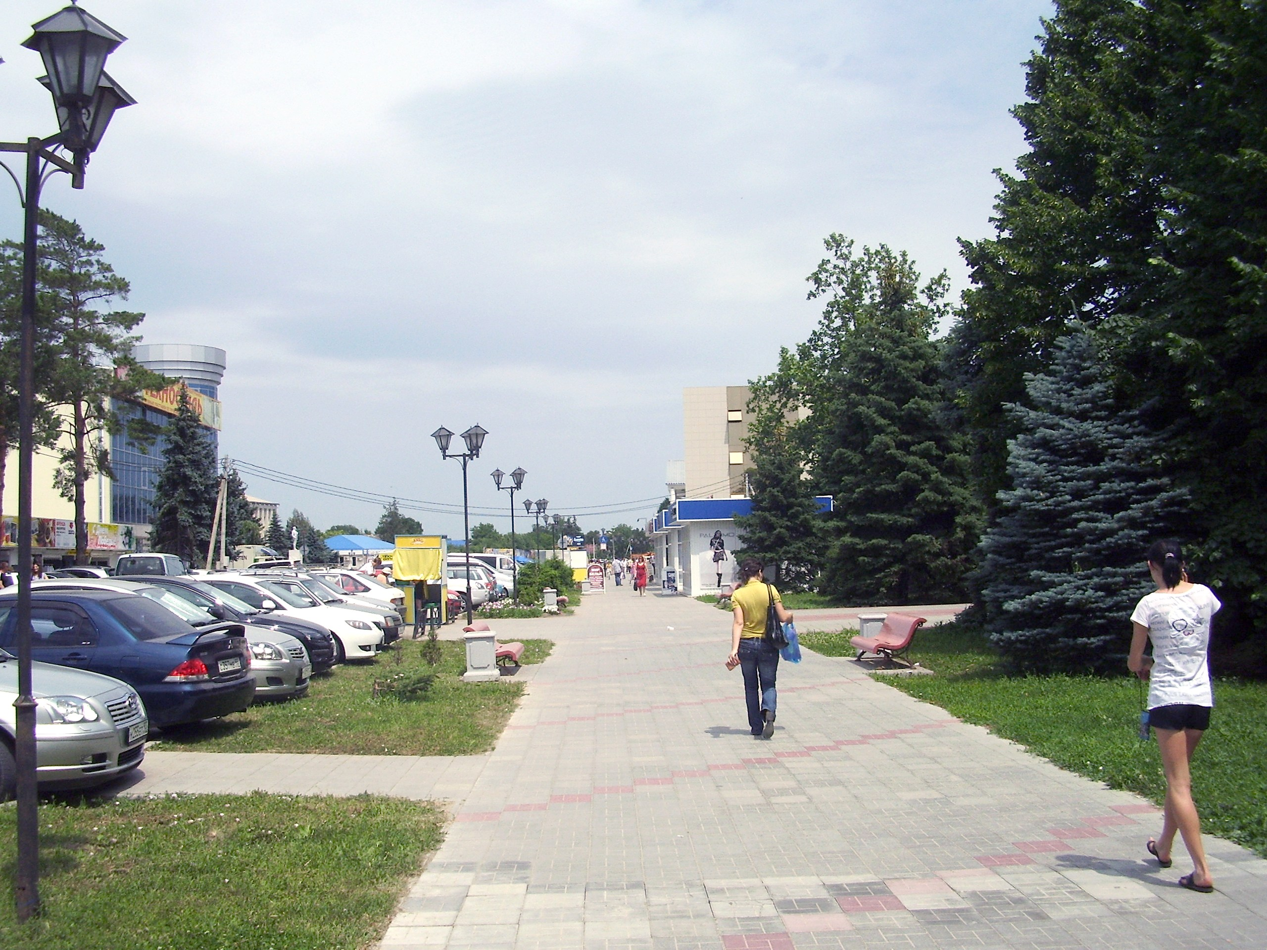 Тимашёвск. В центре города.